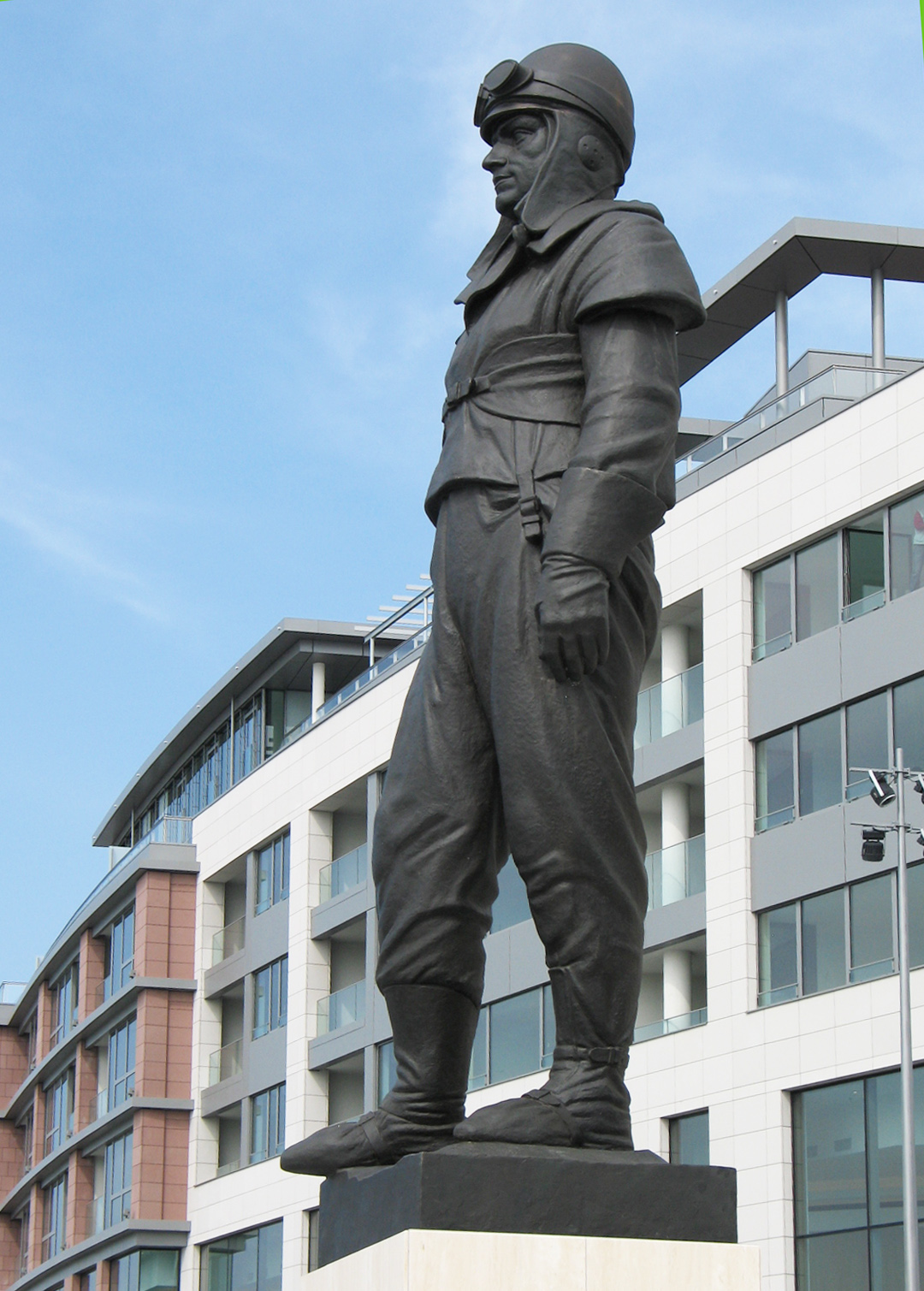 Pamätník generálovi Milanovi Rastislavovi Štefánikovi v Bratislave. Vyhotovenie sádrového modelu realizovali: Mgr.art.Peter Valach, Mgr.art.Pavol Dubina, Mgr.art.Jana Dušková.